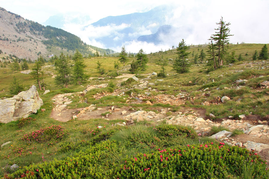 Tratto del sentiero che sale da Champorcher per raggiungere il Colle del Lago Bianco ed il rifugio Barbustel, nel parco naturale del Mont Avic